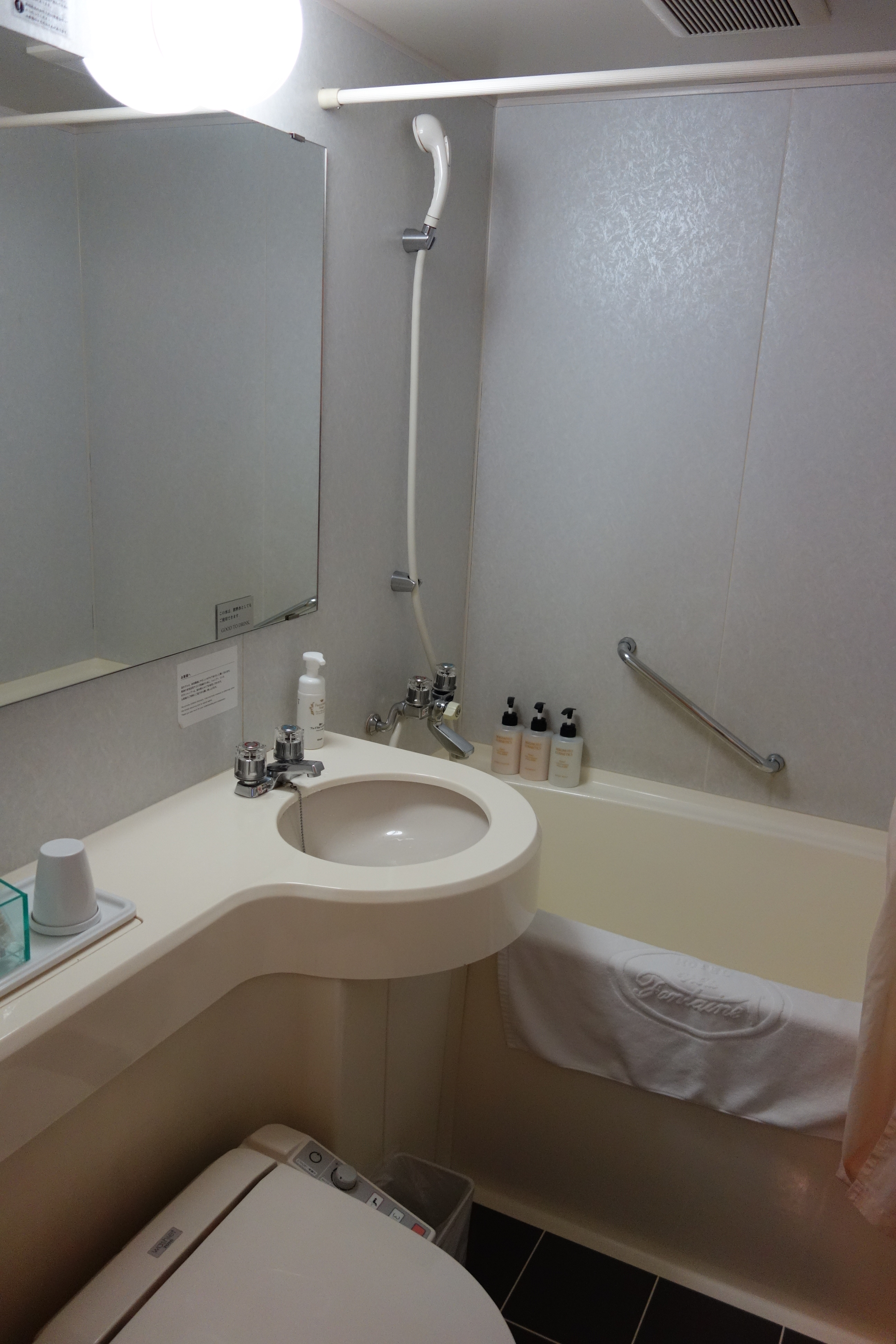 心齋橋 ホテルヴィラフォンテーヌ心斎橋